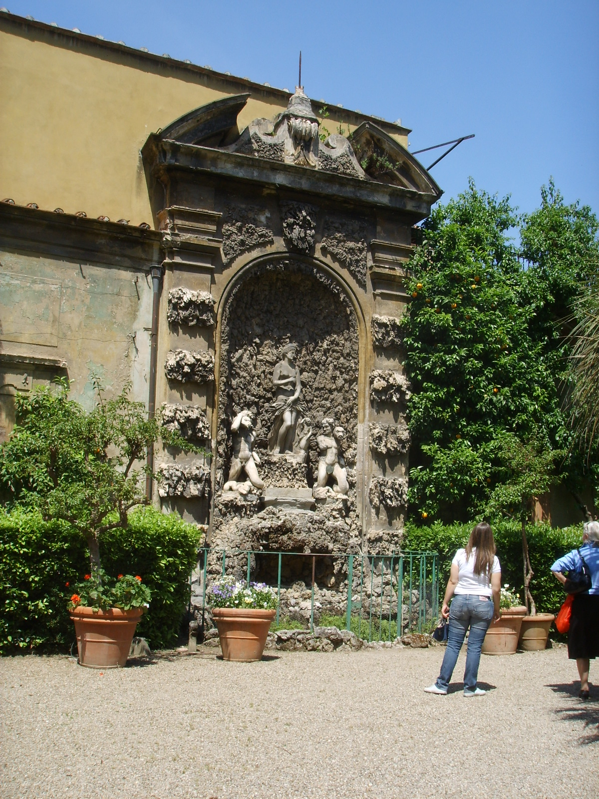 Palazzo Budini Gattai di Firenze; fontana del giardino. Le statue di Afrodite nascente dalle acque e dei Tritoni ai suoi lati sono di Giovanni Bandini.